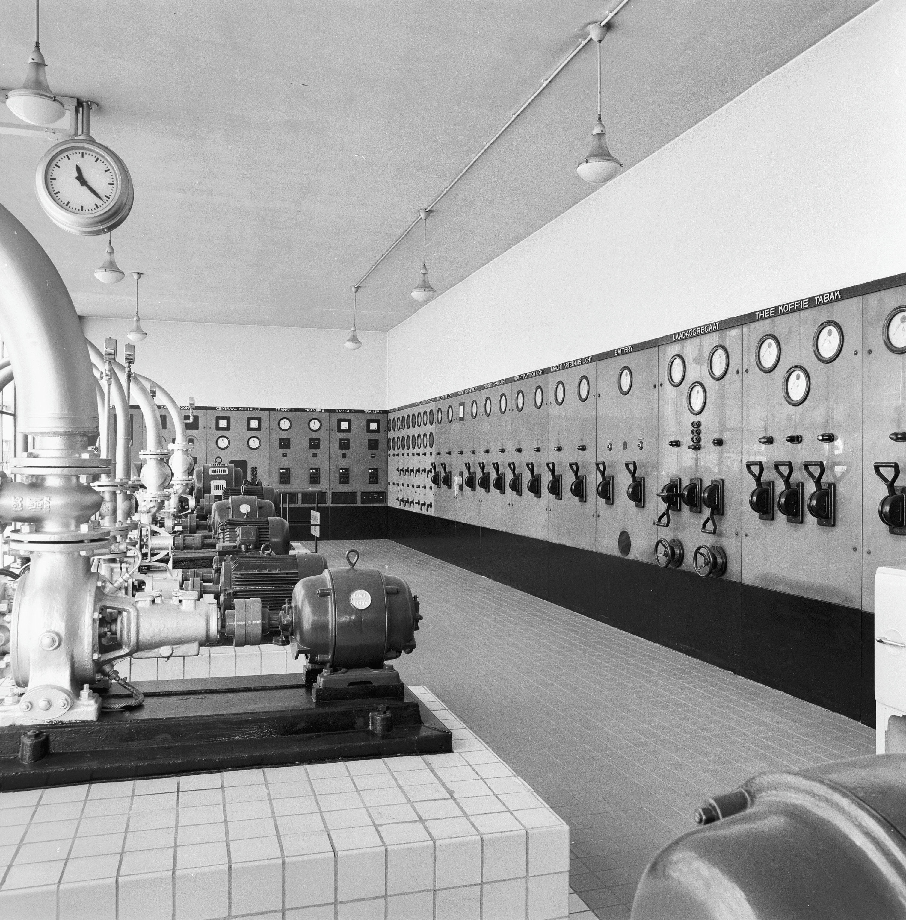 Van Nellefabriek: interieur centrale machinekamer